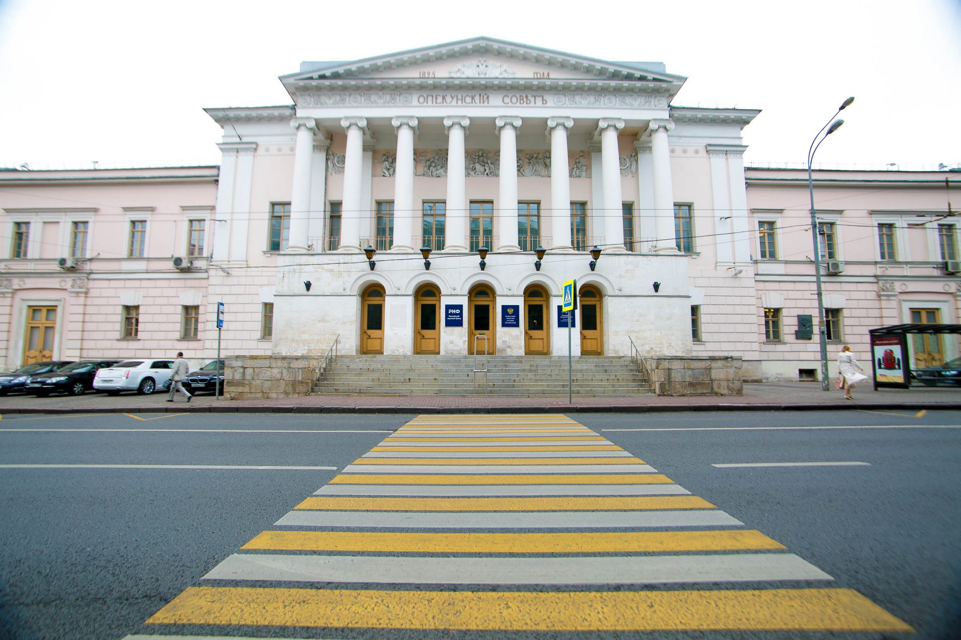 Здание РНФ. г. Москва, улица Солянка, дом 14, строение 3